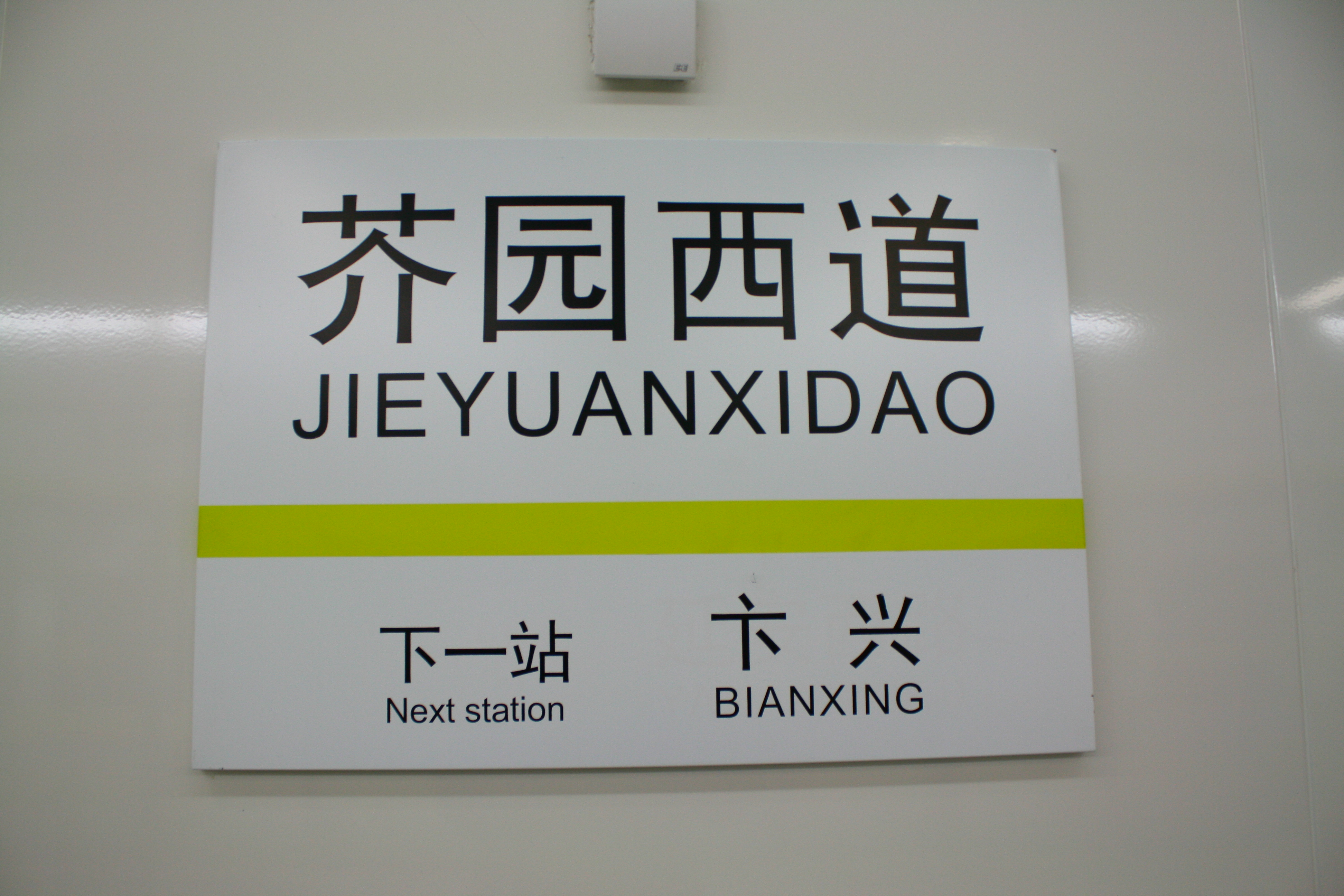 天津地鐵二號線芥園西道站站牌 0001 2012-11-18